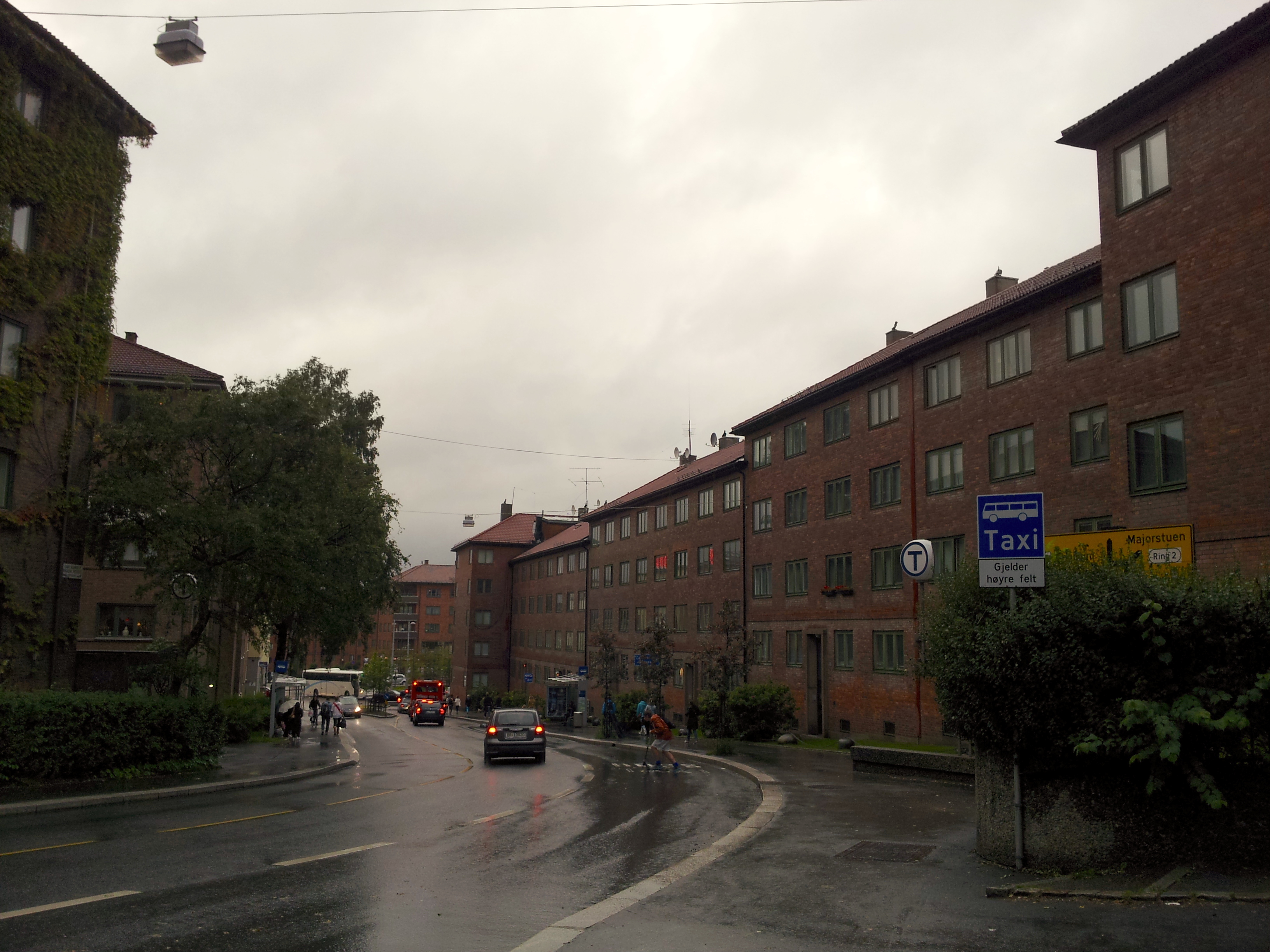 Grenseveien på Carl Berner i Oslo, like ovenfor inngangene til T-banestasjonen.